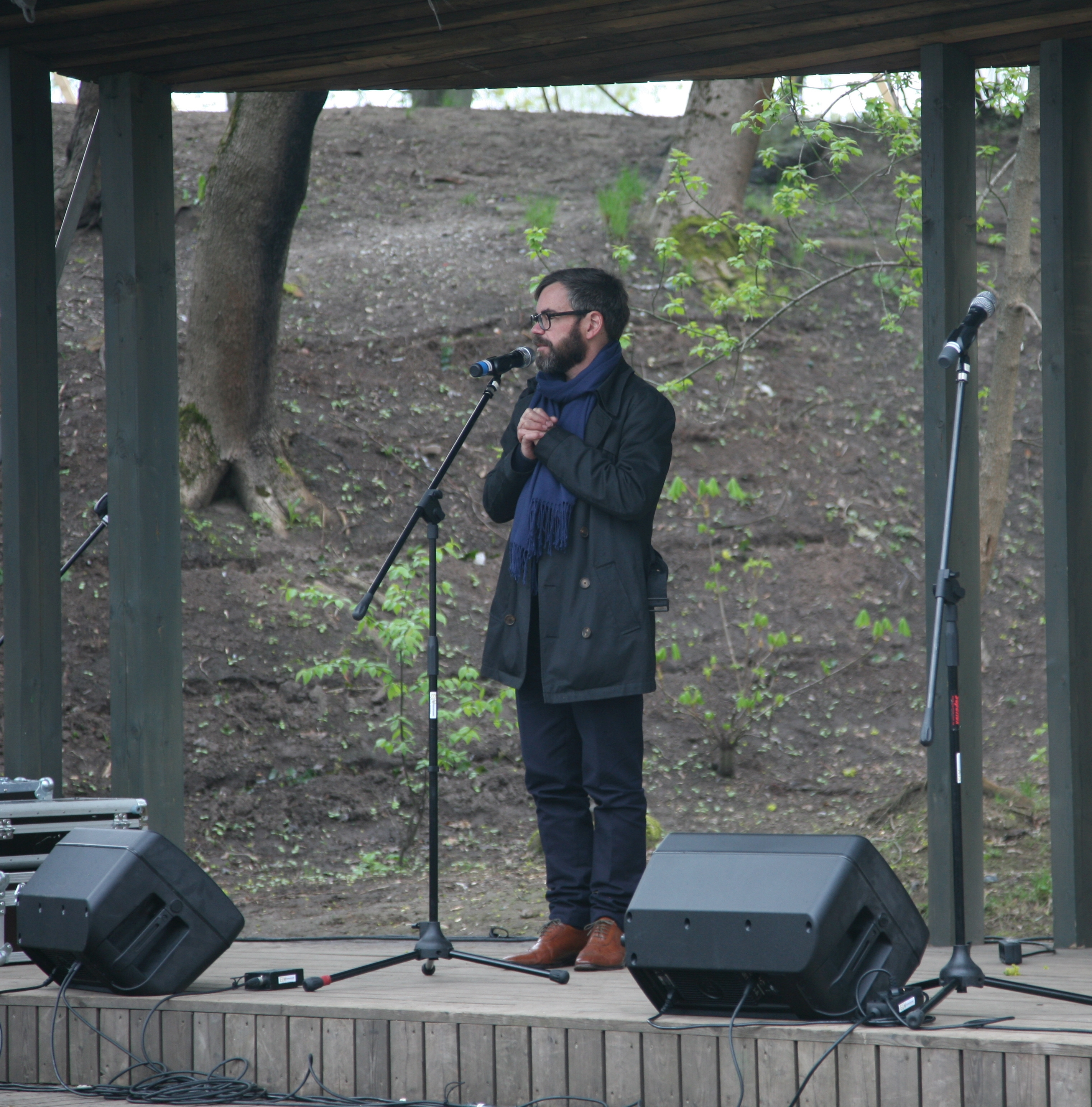 David Wagner Prima Vista 2015 avamisel